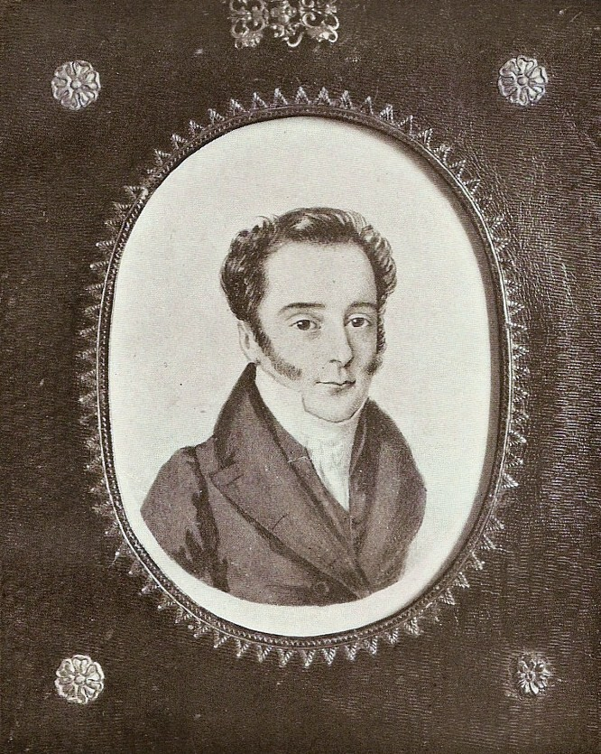 Гавриил Антонович Катакази (1794—1867)